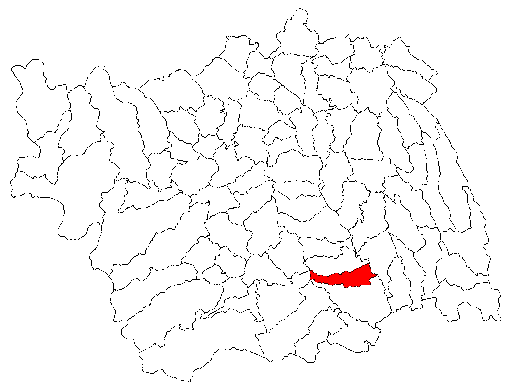 Categorie:Hărţi ale judeţului Bacău